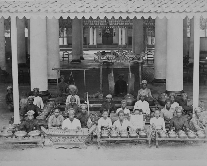 foto. Gamelanorkest